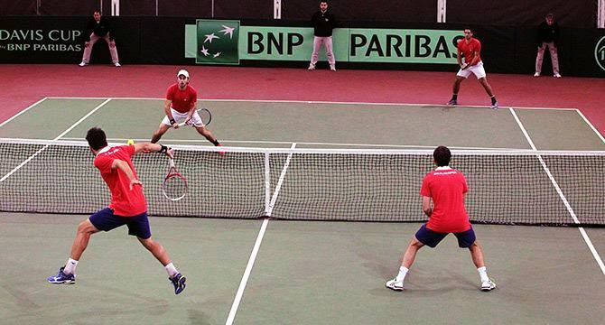 Vasko Bulgaria